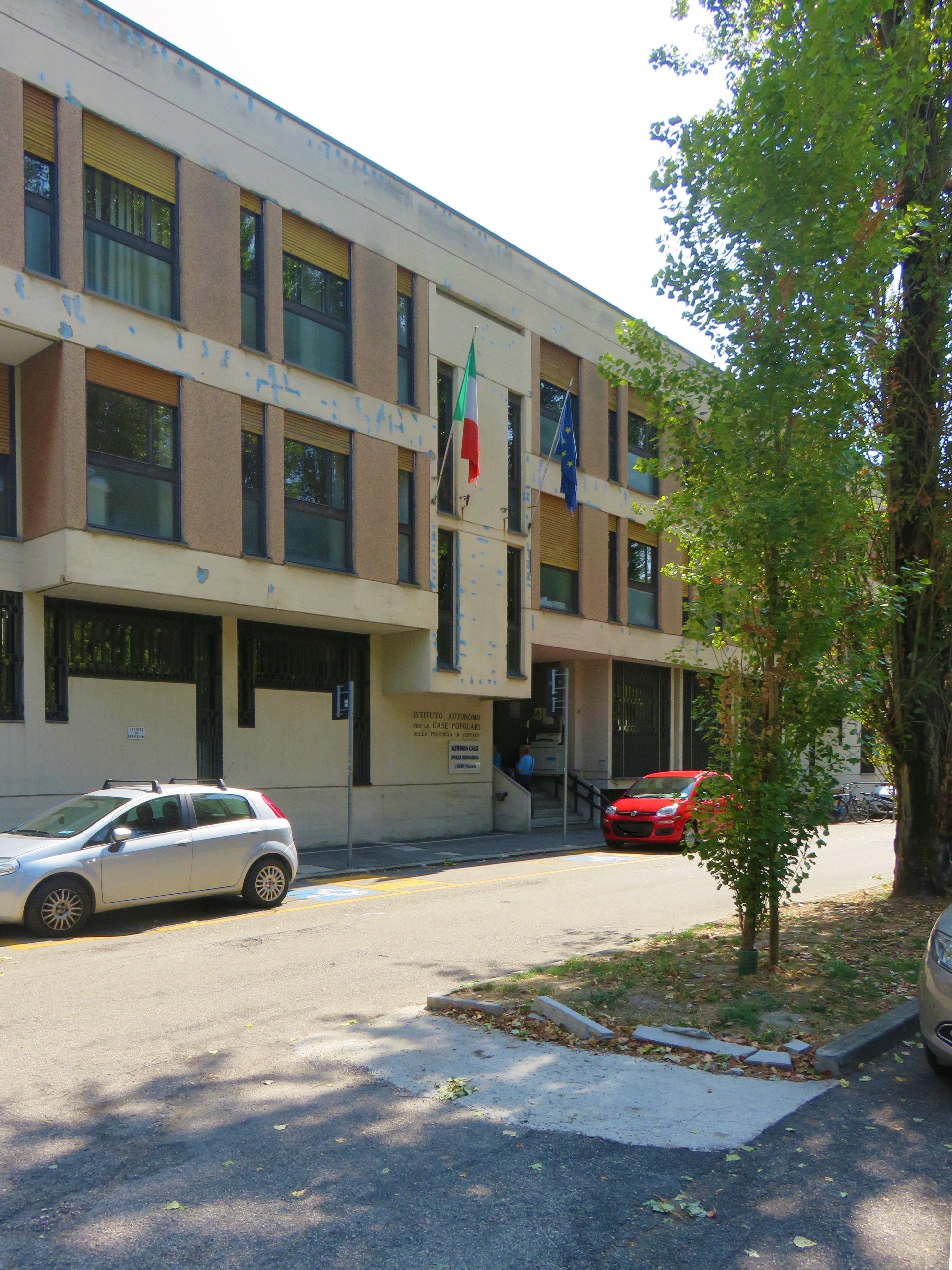 Corso Vittorio Veneto, a Ferrara, unisce viale Cavour con piazza XXIV Maggio. Sede ACER, ex Istituto Autonomo Case Popolari